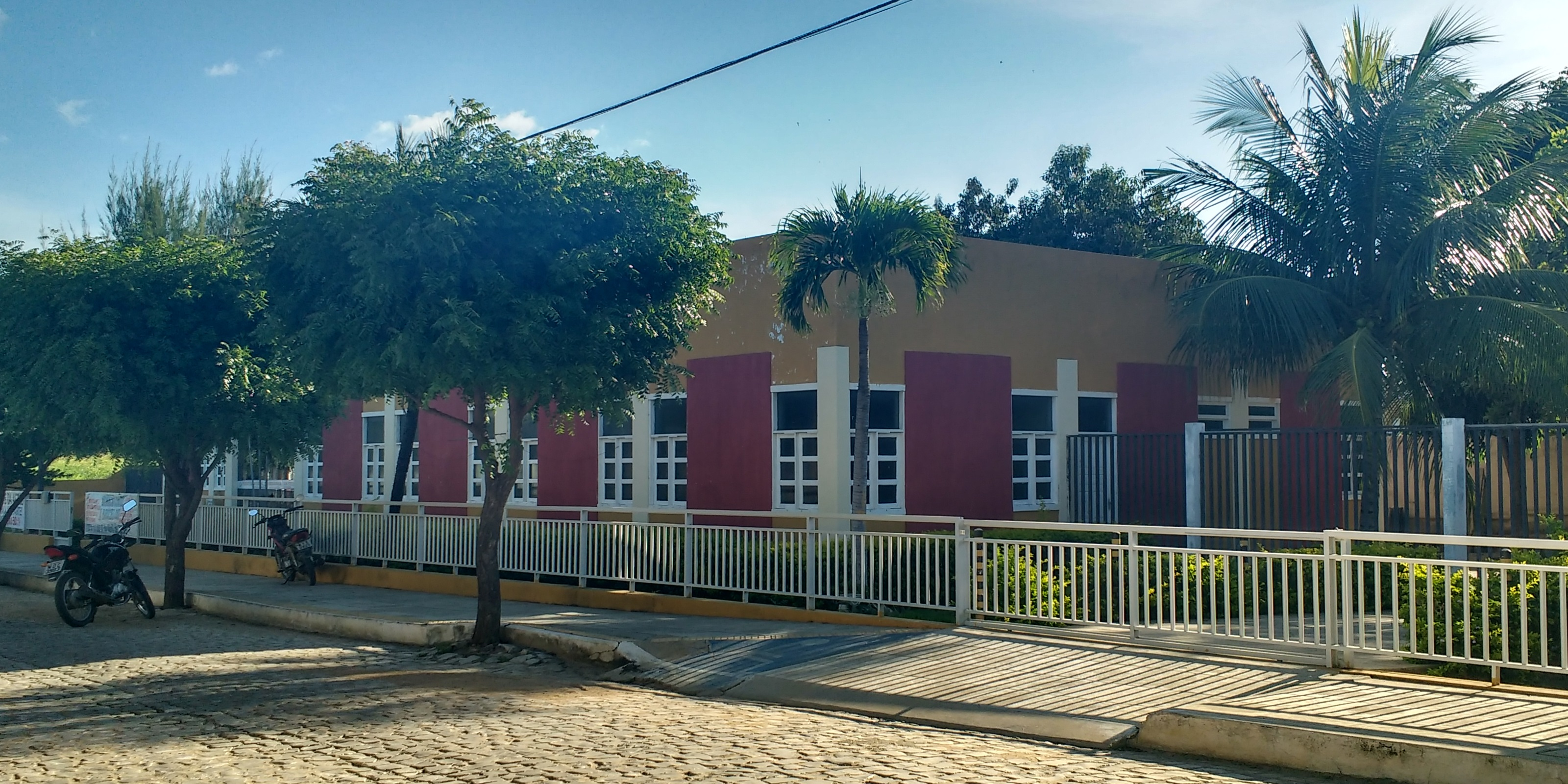 Centro Administrativo Renato Estêvão de Freitas, onde funciona a prefeitura de Serrinha dos Pintos, Rio Grande do Norte (Brasil)